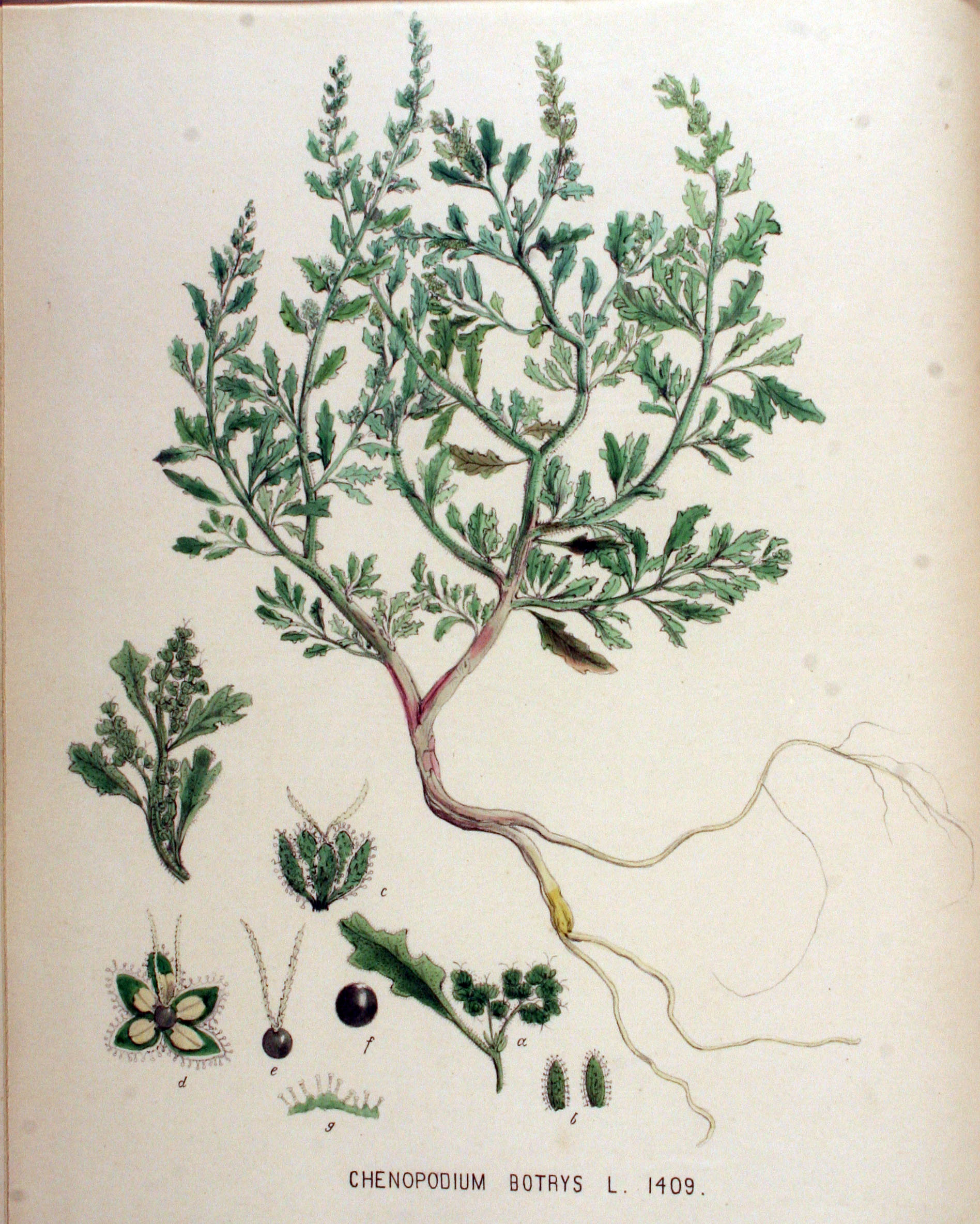 Chenopodium botrys L.